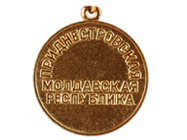 PMR state order